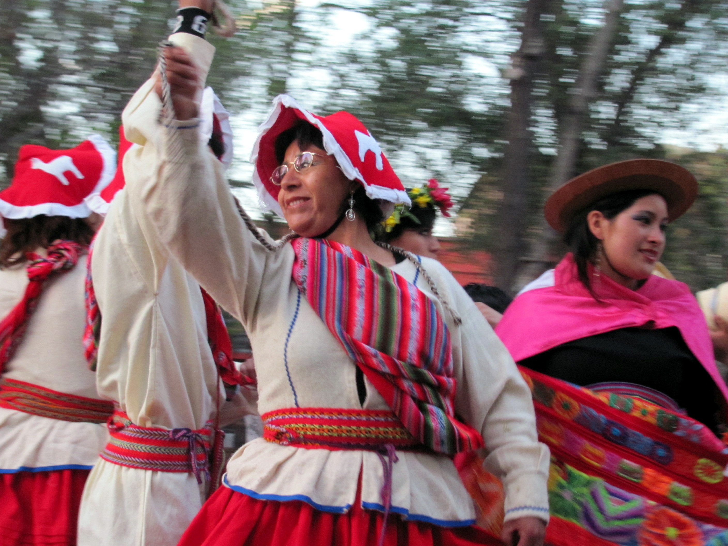 Grupo de inmigrantes peruanas bailando en Chile durante la "Fiesta de la Primavera" en Santiago, Chile.